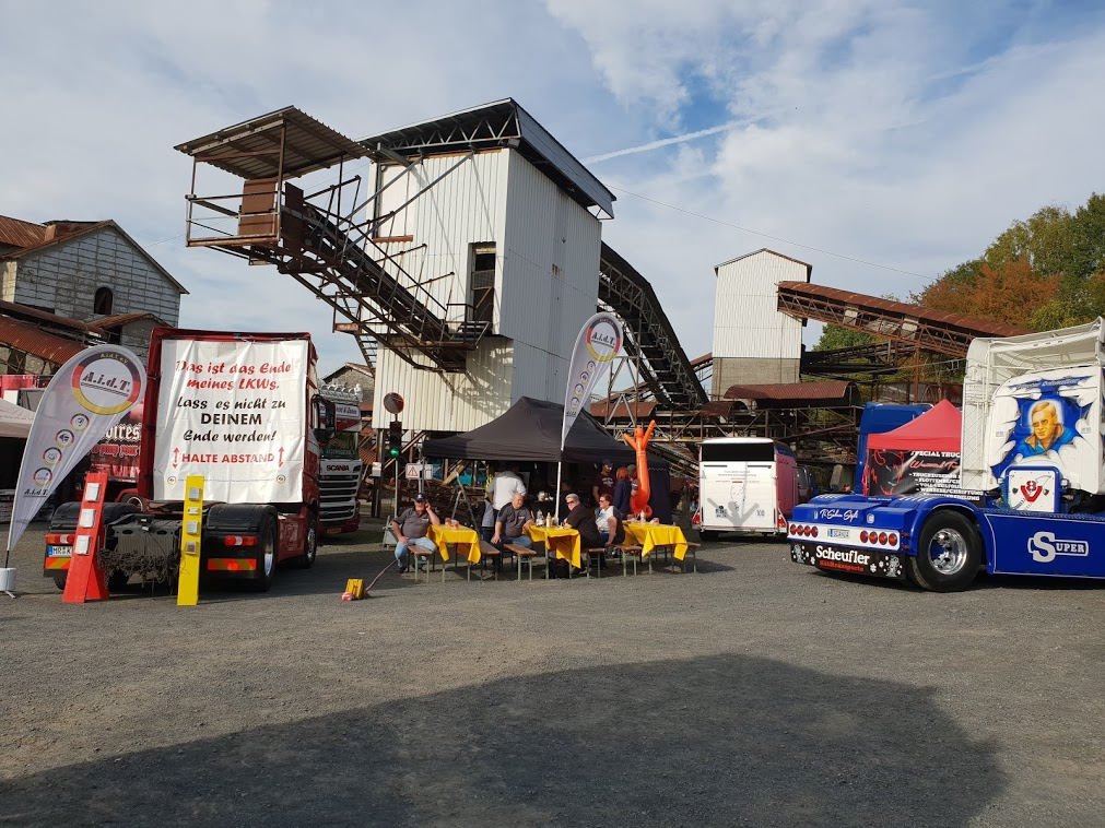 A.i.d.T.e.V. mit Trixi-Spiegel mit Ampel wegen Toten Winkel und Abstand-Kampagne im Stöffel-Park Truck Festival in Enspel